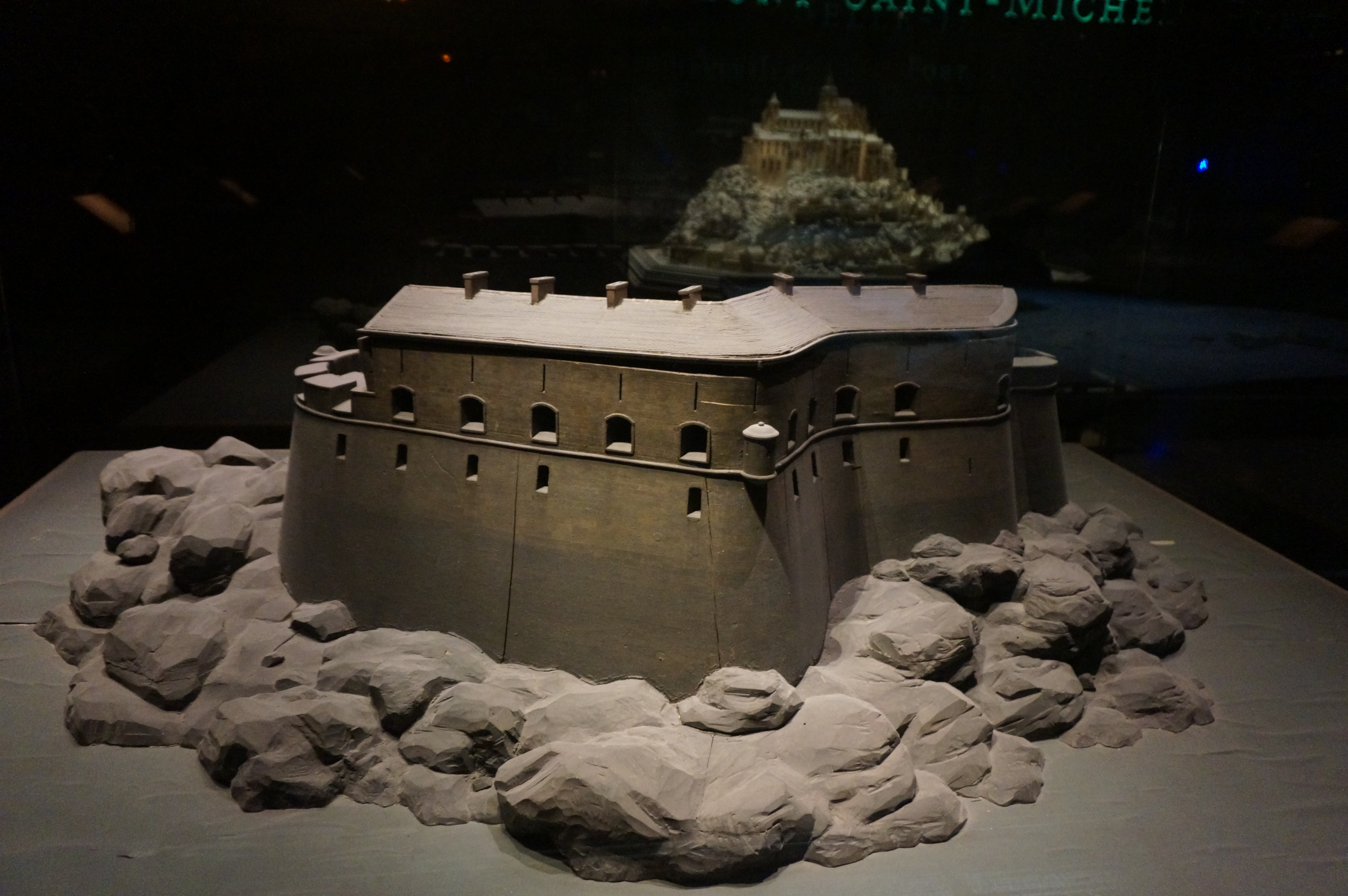 Présenté au Musée des Plans-Reliefs. Le Mont-st-Michel derrière, la date de la maquette est 1700, 1813.